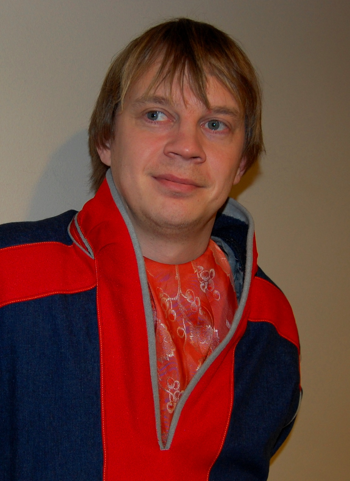 Trond Are Anti er 2. kandidat til sametingsvalget på felleslista mellom Norske Samers Riksforbund (NSR) og Samefolkets Parti i Østre valgkrets. Han er også politisk nestleder i NSR og kommunestyrerepresentant i Tana kommune.